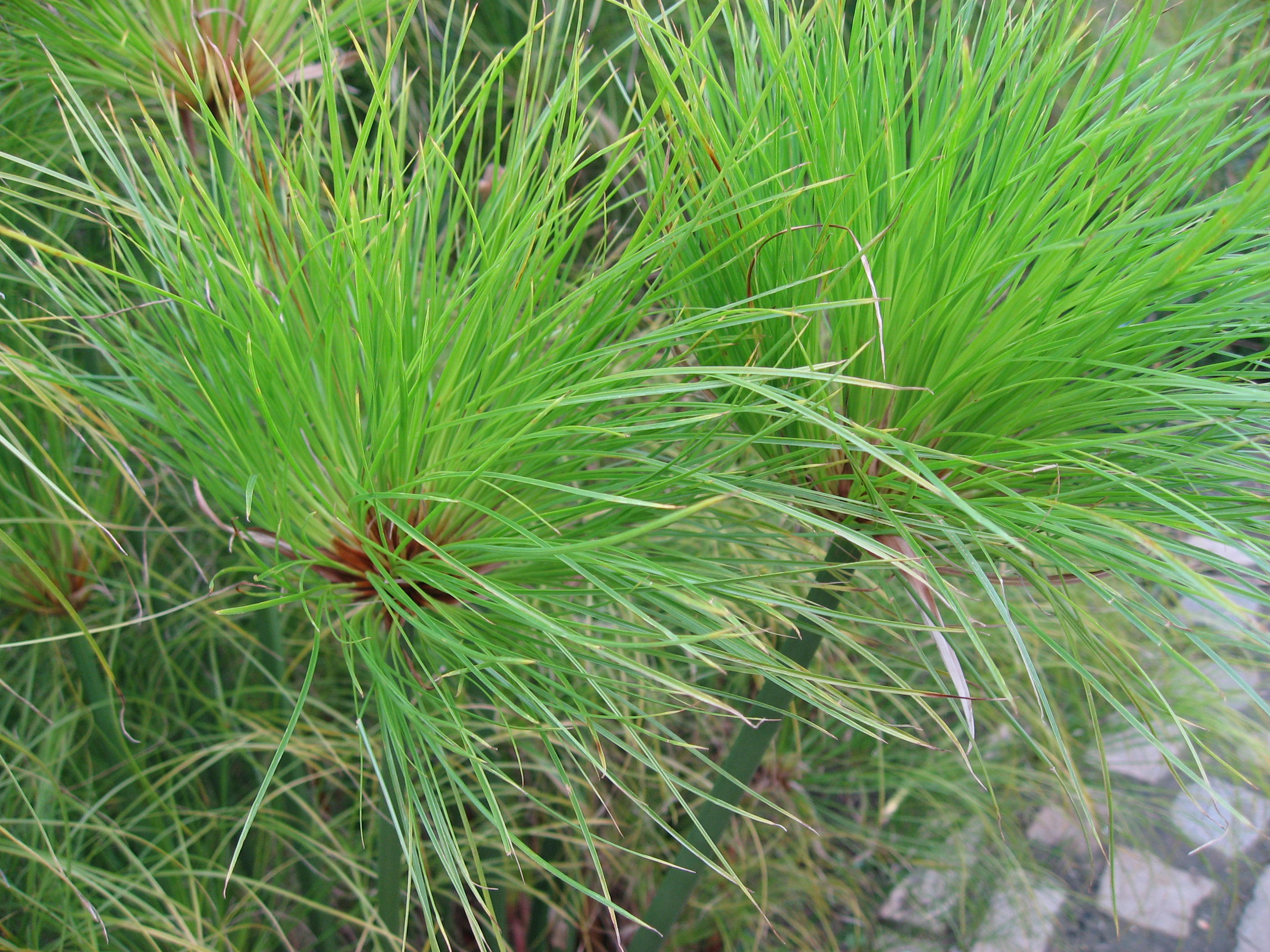 Cyperus papyrus in Parc floral de Paris Map: 48° 50' 19" N 2° 26' 33" E